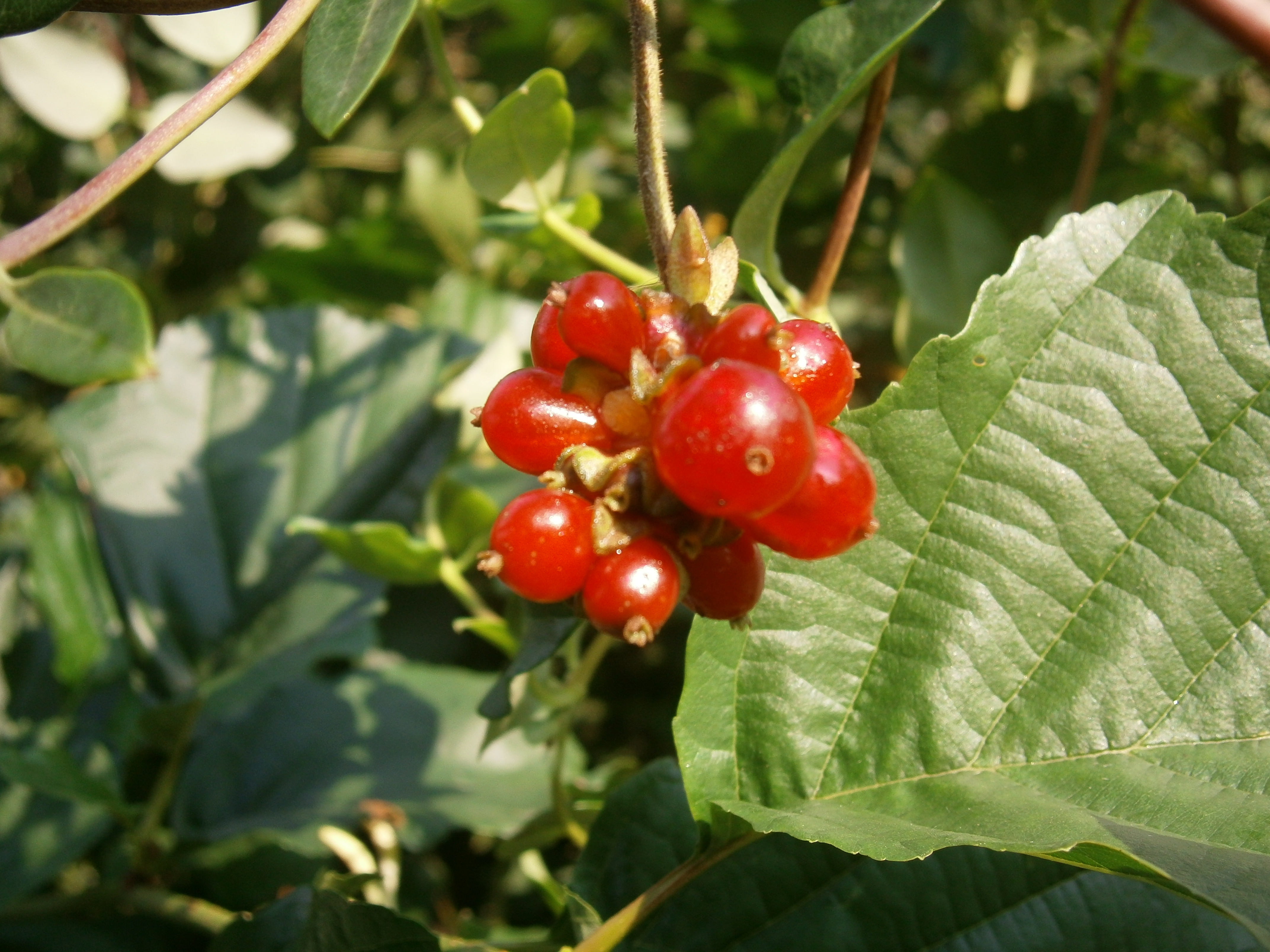 Lonicera periclymenum fruits